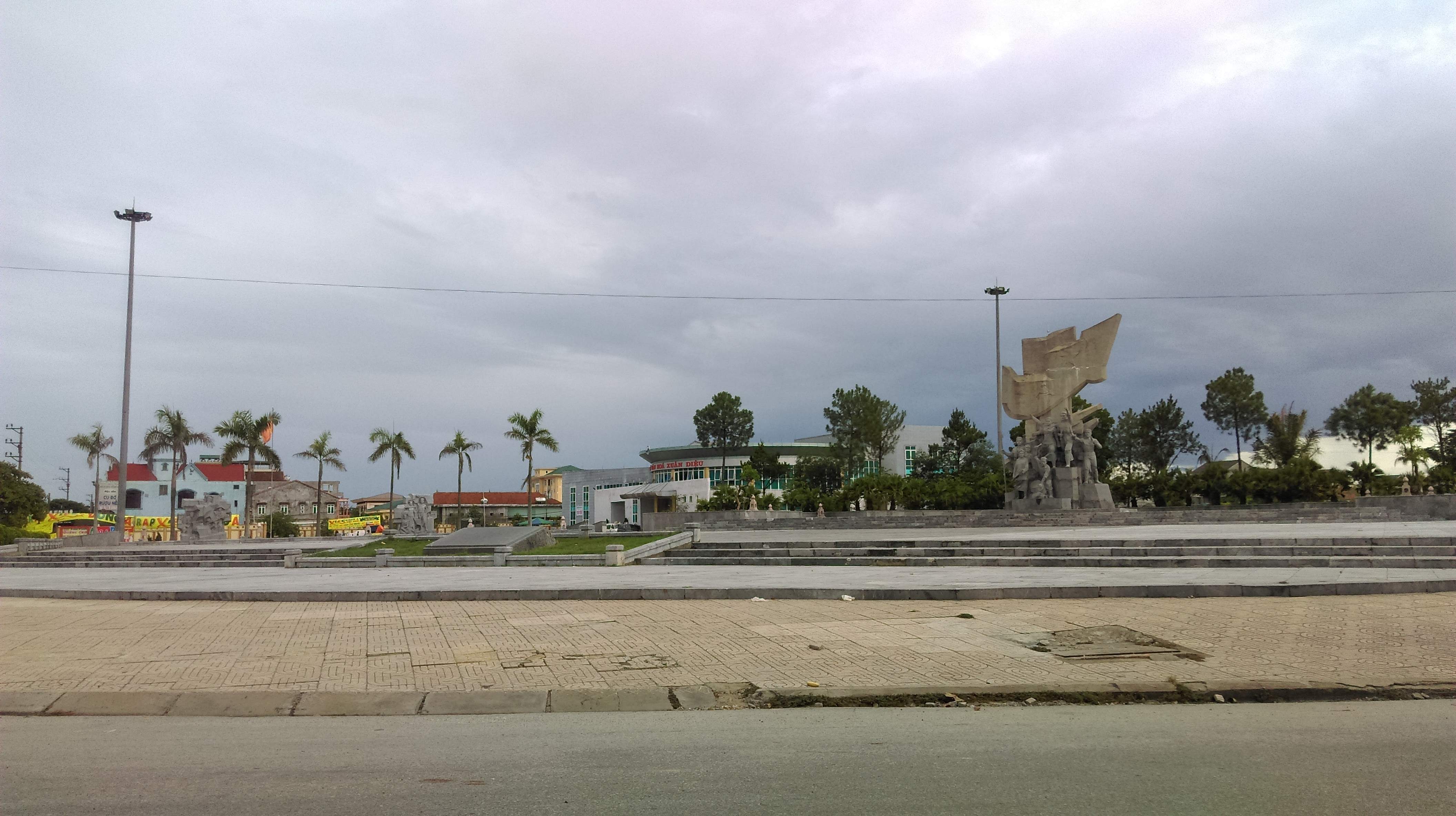 Khu Tưởng niệm Ngã ba Nghèn, Can Lộc, Hà Tĩnh